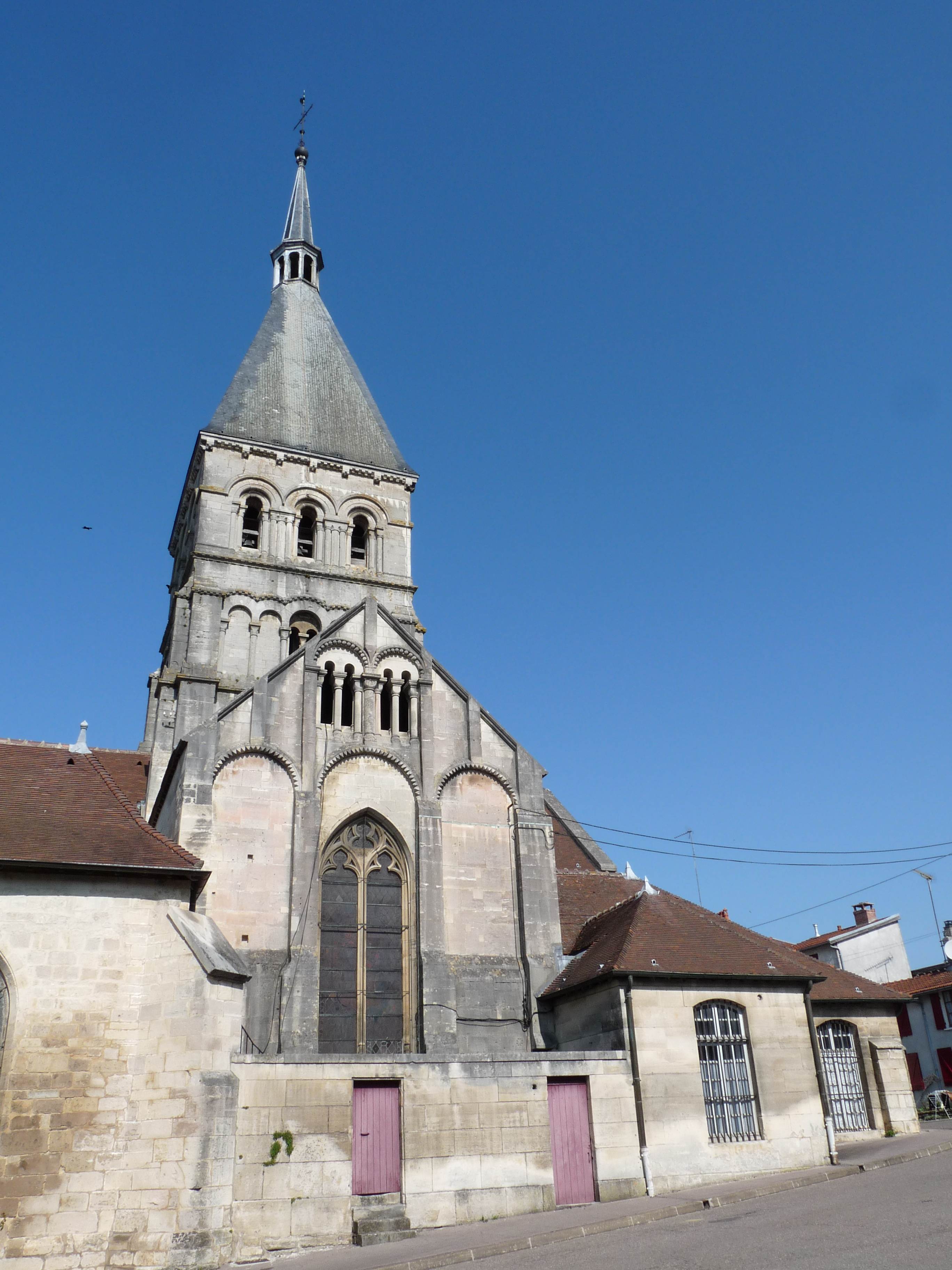 Eglise Notre-Dame de Wassy (Haute-Marne). Classée MH en 1875.